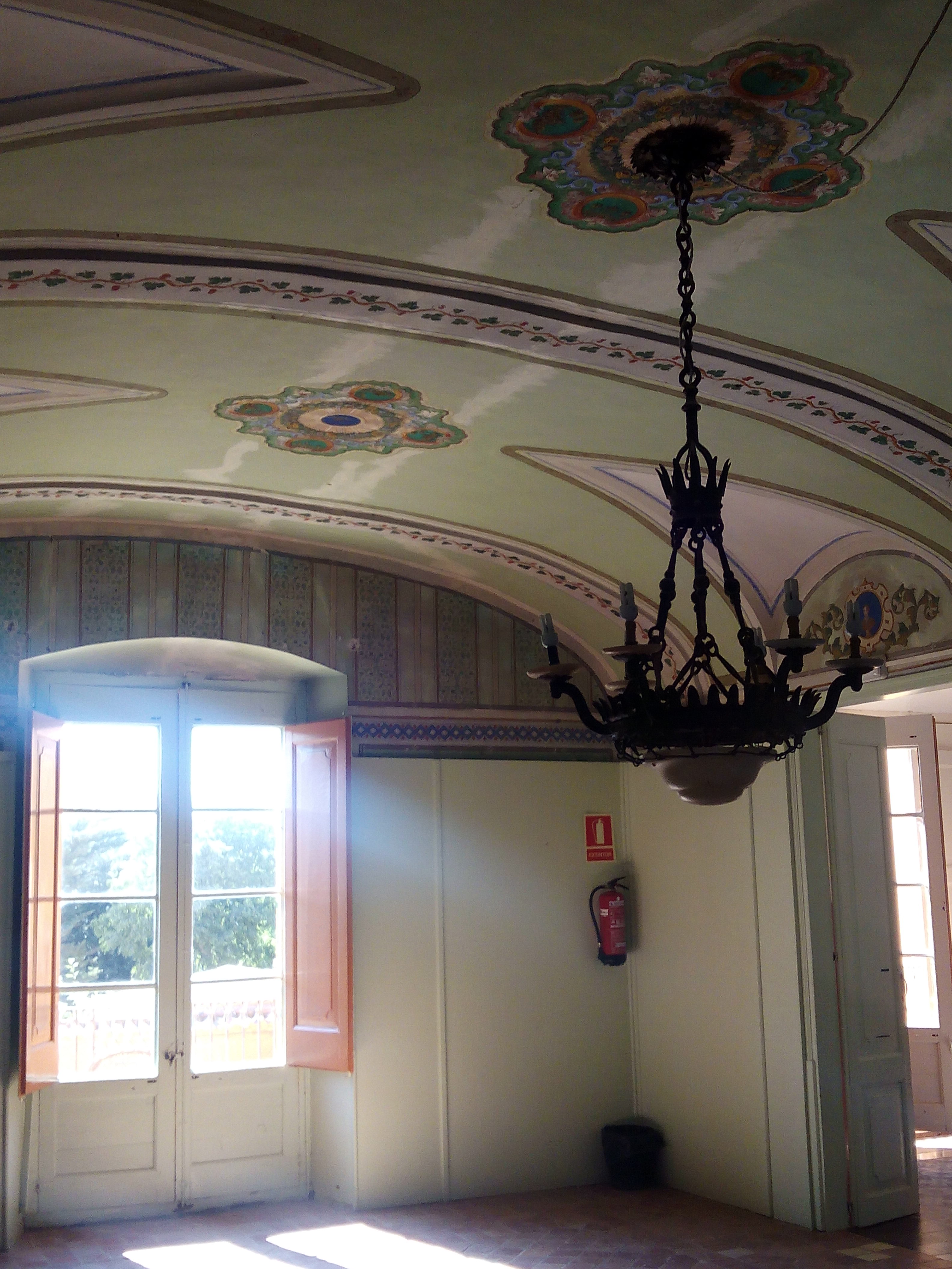 Can Mundet (Vidreres). Actualment casa de colònies de Rosa dels Vents